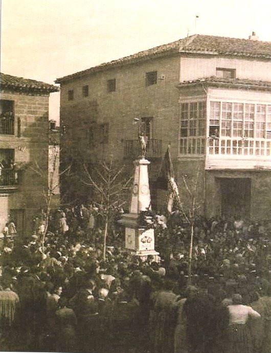 Estatua de la Libertad, Cenicero, principios del siglo XX.